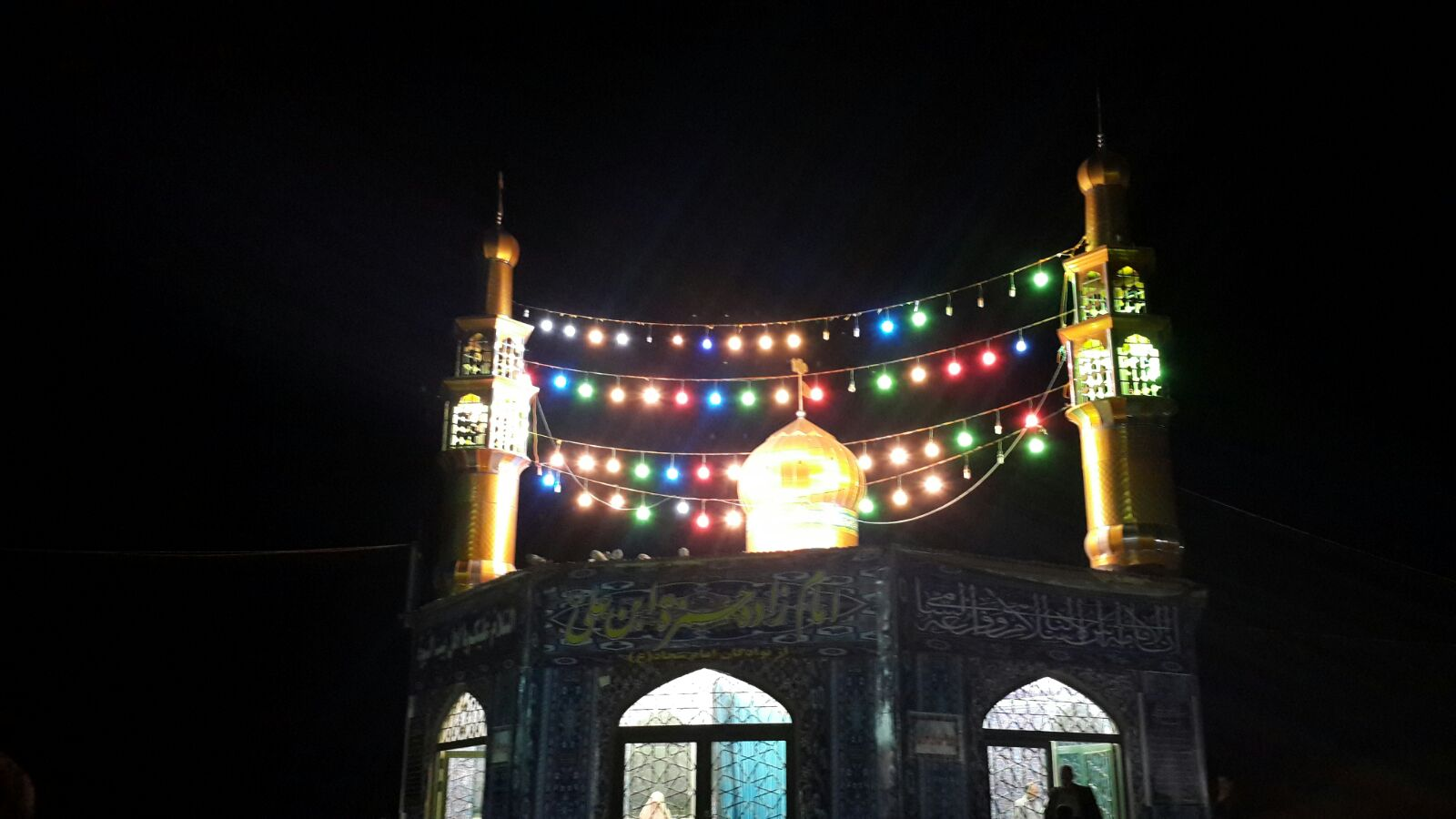 امام‌زاده حمزه‌علی بلداجی